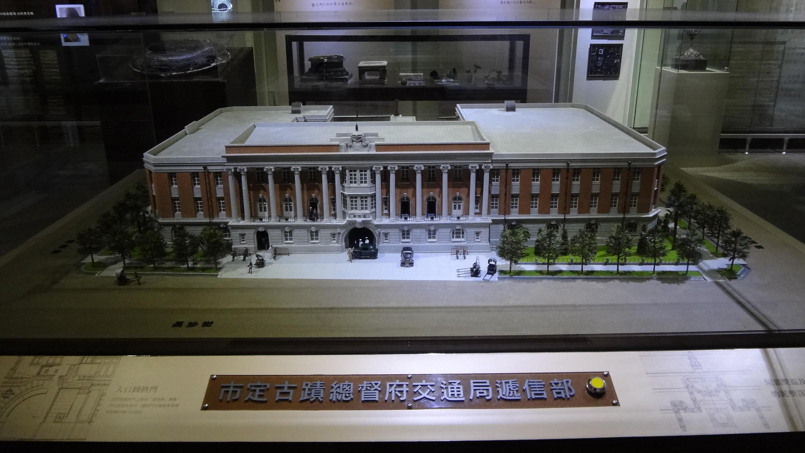 中華民國國史館展示的臺灣總督府交通局遞信部模型。